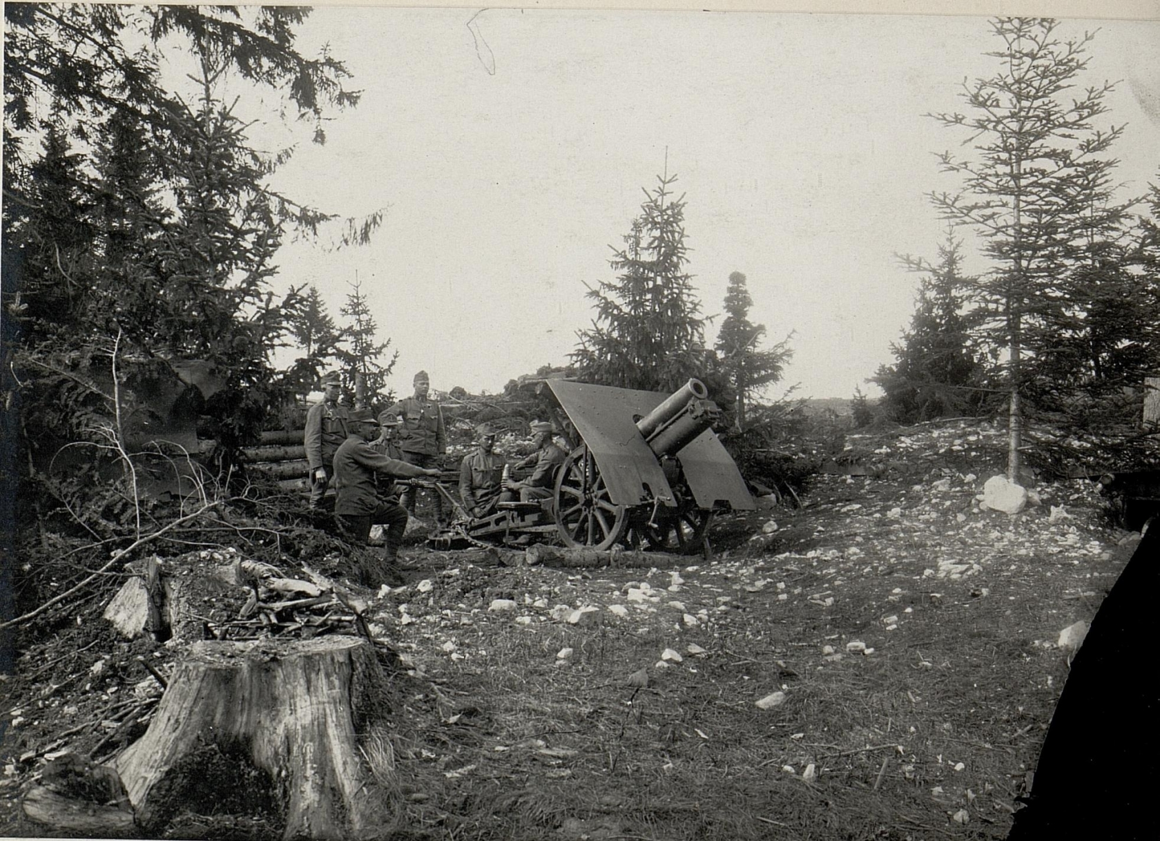 10 cm Gebirgshaubitze auf Cost alta. Aufgenommen im Mai 1916.